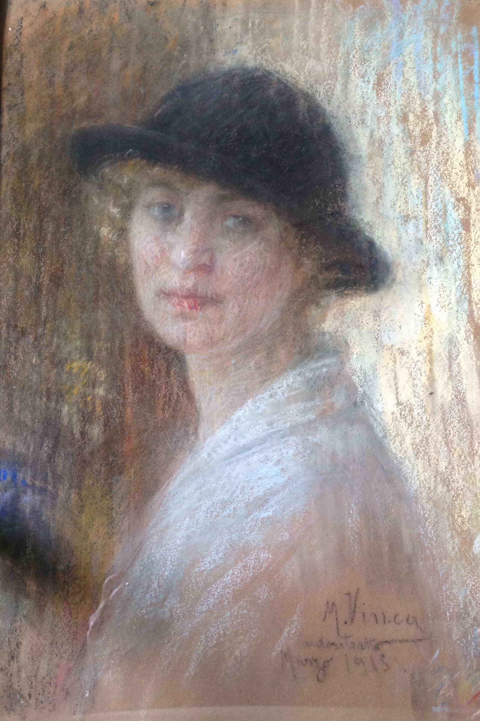 Autoritratto a pastello dell'artista da giovane, marzo 1913 (Collezione privata).